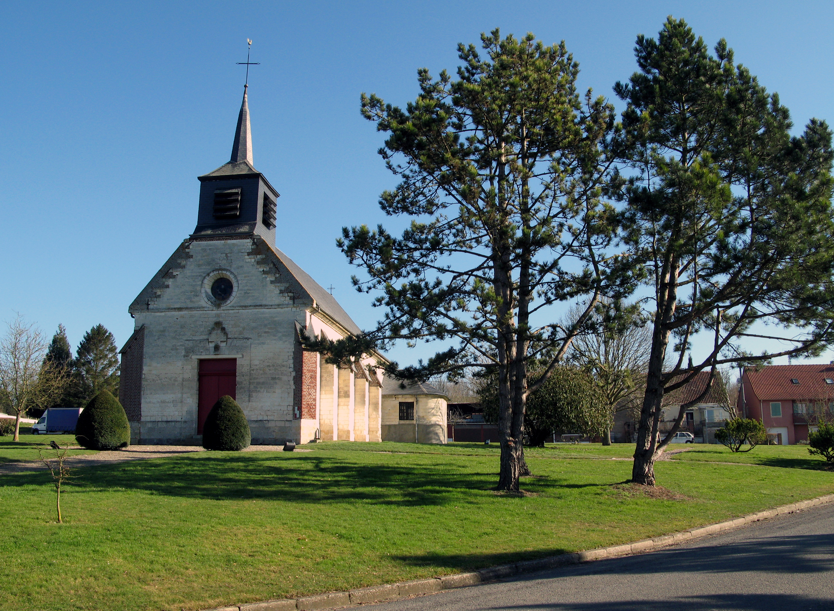 Remiencourt (Somme, France) - Église Notre-Dame-de-la-Nativité. . .